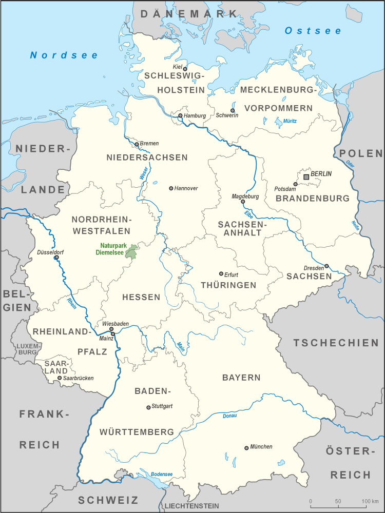 Karte des Naturparks Diemelsee in Deutschland